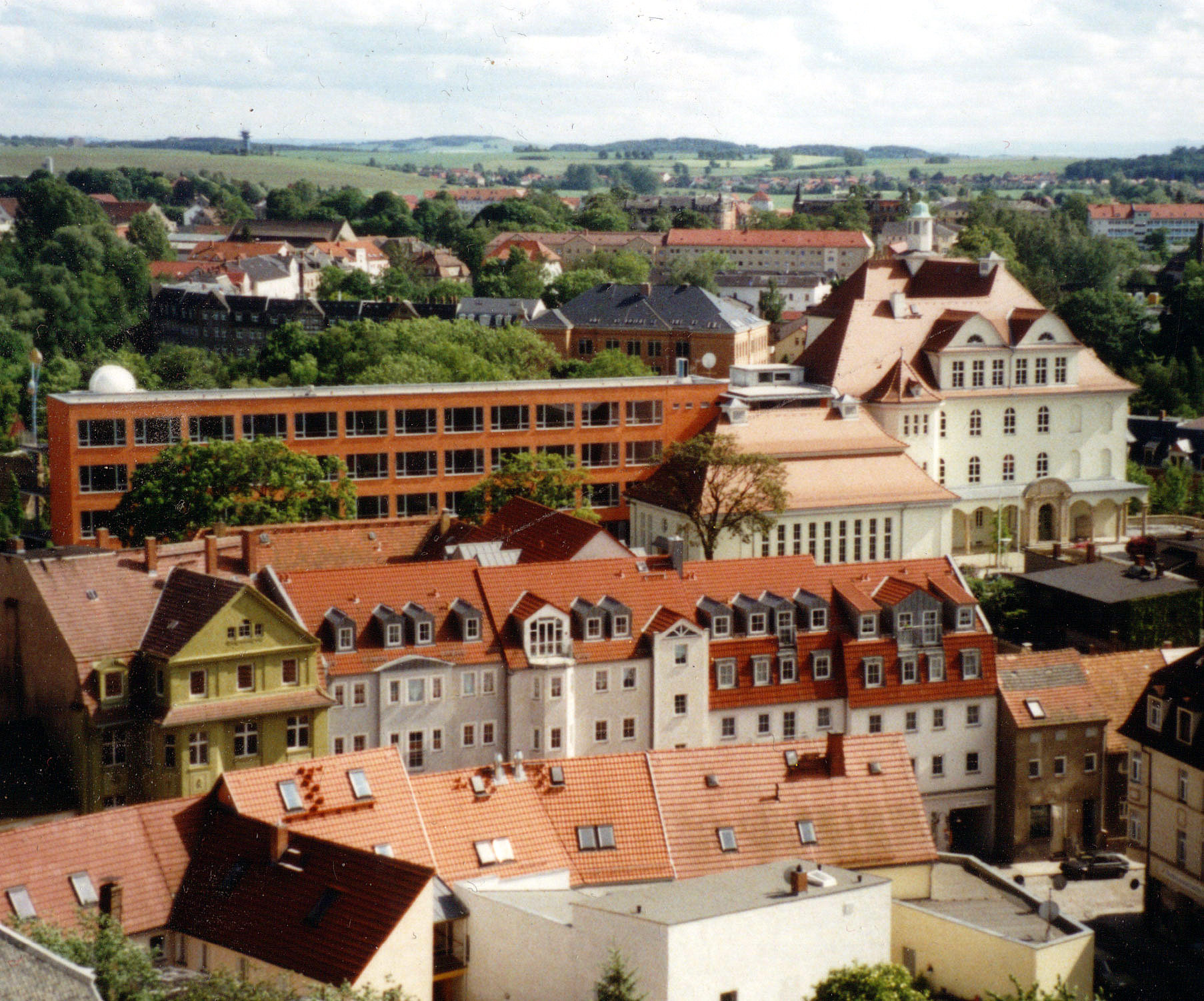 Humboldt-Gymnasium in Radeberg, im Vordergrund die Hauptstrasse, im Hintergrund die Pestalozzi-Mittelschule